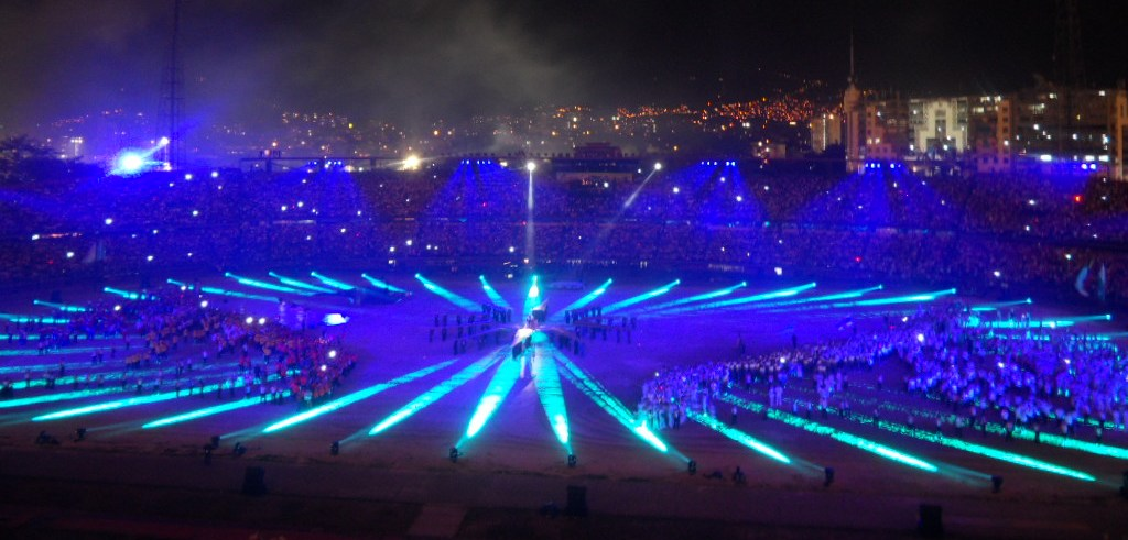 Ceremonia de apertura de los Juegos Sudamericanos de 2010